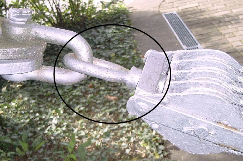 Block eines Flaschenzuges